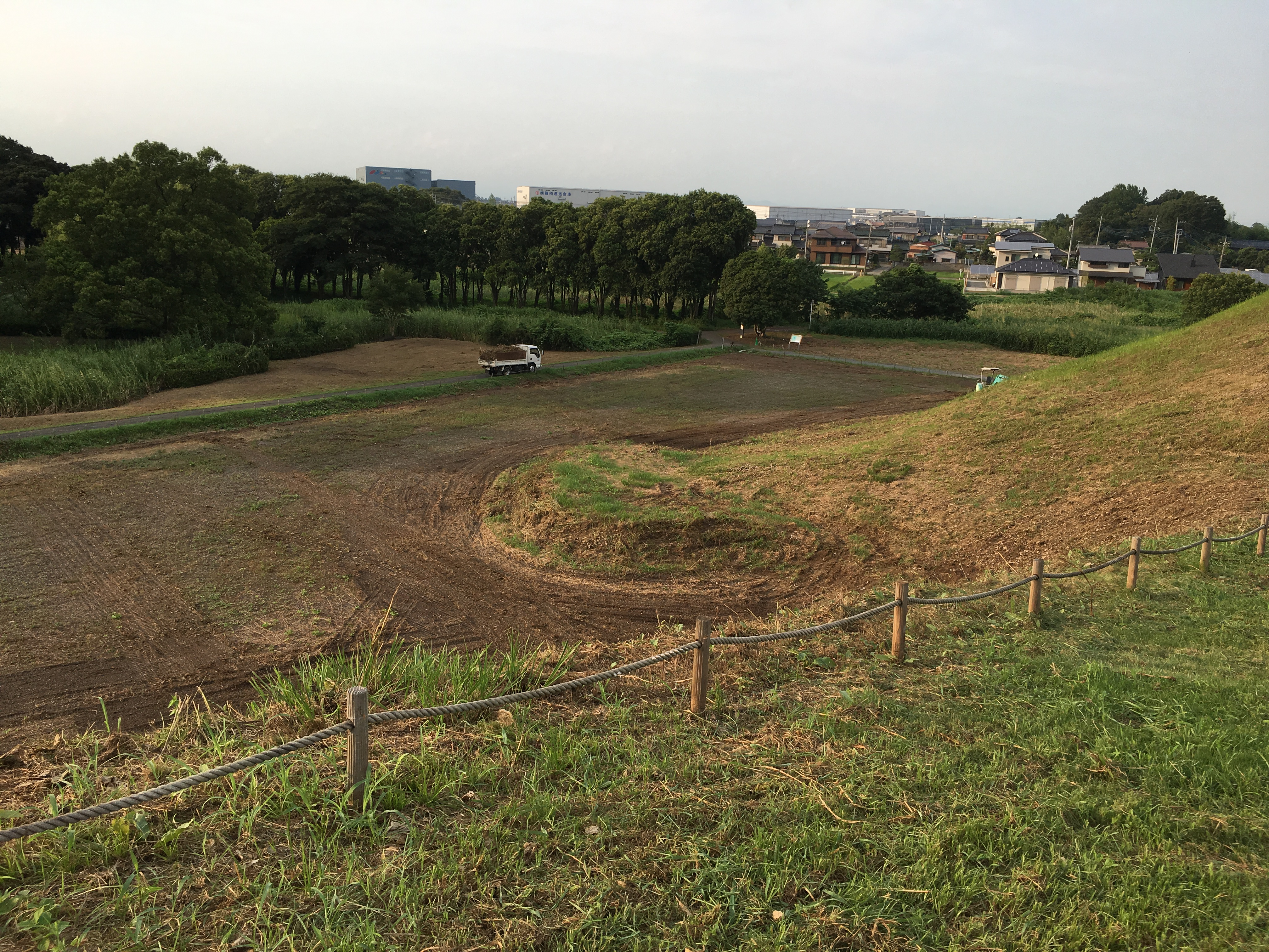 写真中央にある円状に盛り上がった部分が造出。